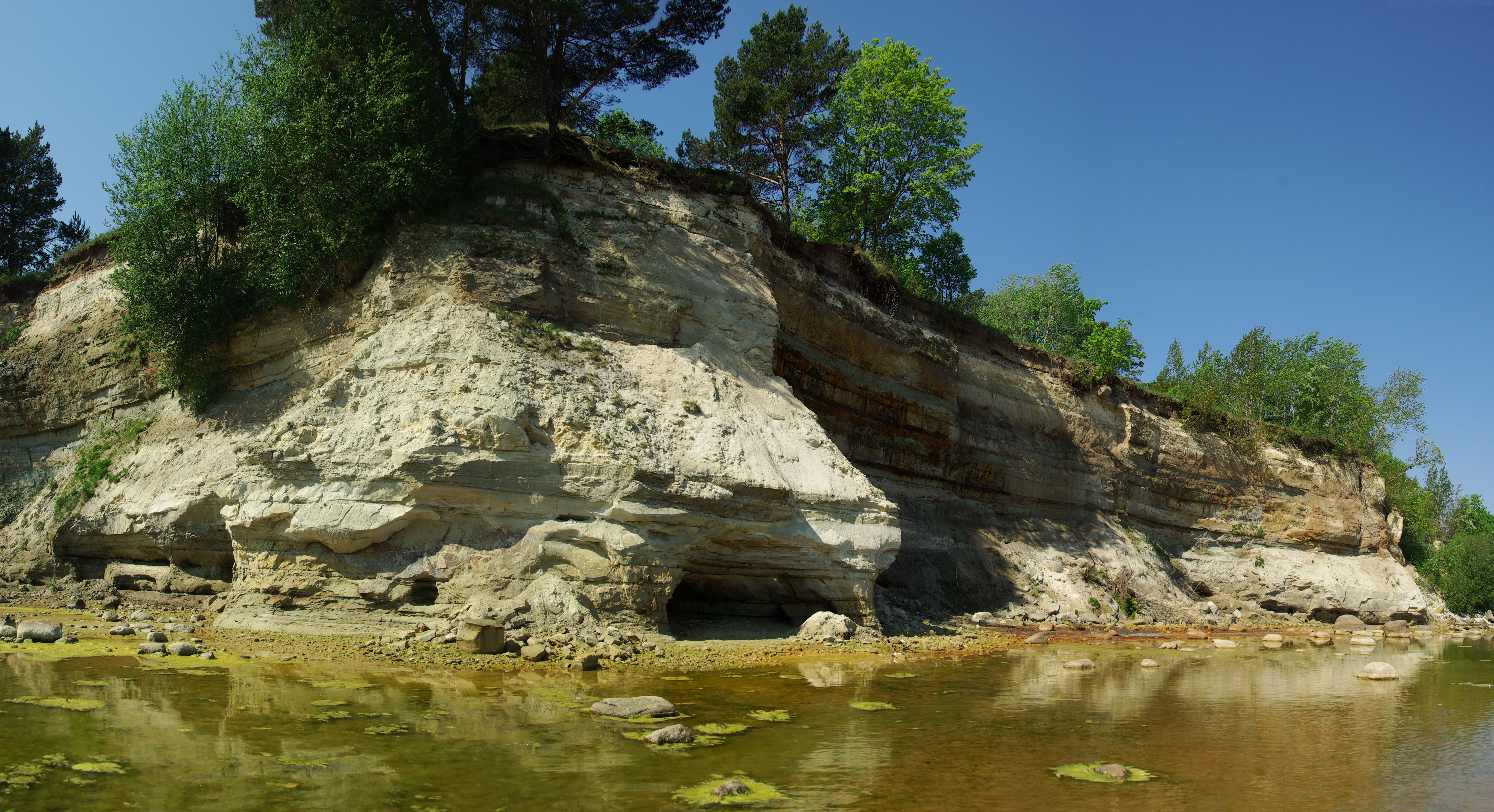 Tilgu koopad ja kivikülv; Tilgu koopad